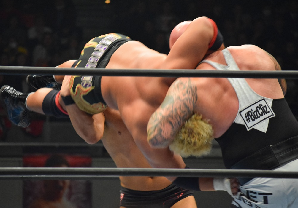 2016年2月11日 大阪府立体育会館 「THE NEW BEGINNING in OSAKA」 真壁刀義（中）にマジックキラーを決めるカール・アンダーソン（奥）とドク・ギャローズ（手前）